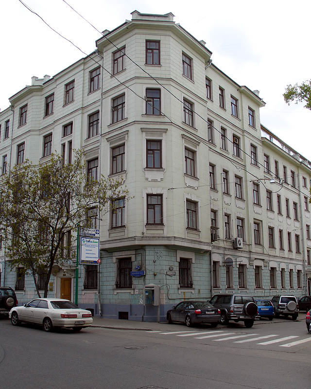 Zemlyanoy Val (Garden Ring), Moscow Москва. Земляной Вал, 66